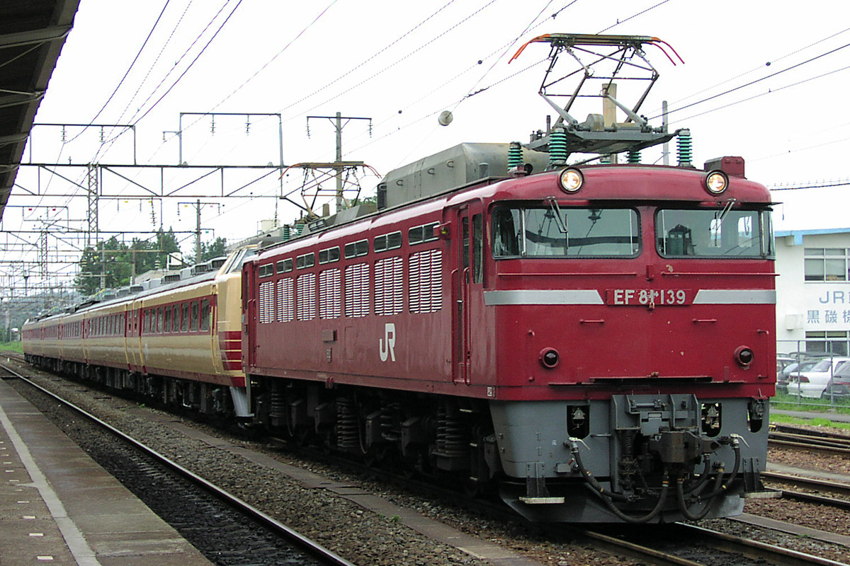 双頭連結器設置機